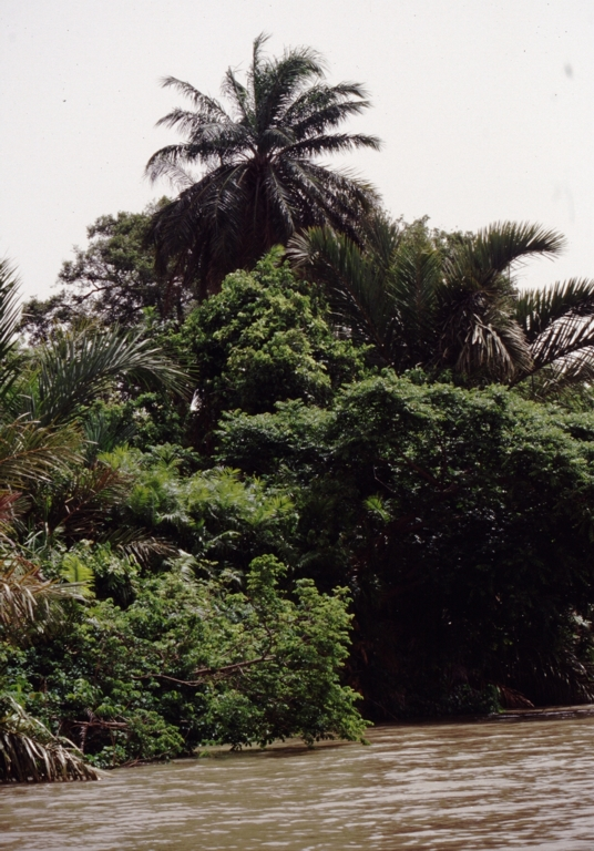 Bootstour auf dem Gambia River bei Janjanbureh Island (McCarty Island) hier wird der Fluß von Galeriewald gesäumt